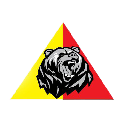 LOGO YONKAV 12